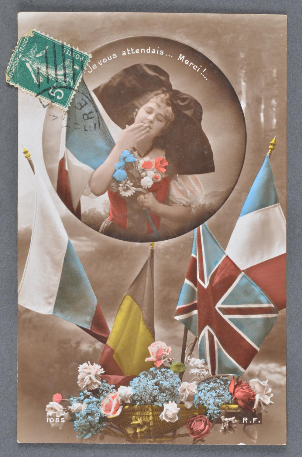 Madame Colombéro parle du grand-père et du grand-oncle de son mari, respectivement Élie Jarjayes et Arthur Bouchet. Monsieur Élie Jarjayes a combattu dans la Somme comme 2e cannonnier servant la 13e artillerie de forteresse à Nice.Il a fabriqué divers objets et laissé un cahier de chansons. Monsieur Arthur Bouchet domicilié à Valavoire était cultivateur, il a laissé des documents médicaux concernant une attestation de grave blessure, certificat de visite médicale, livret d'appareillage, congé de convalescence illimitée et carte d'invalidité.